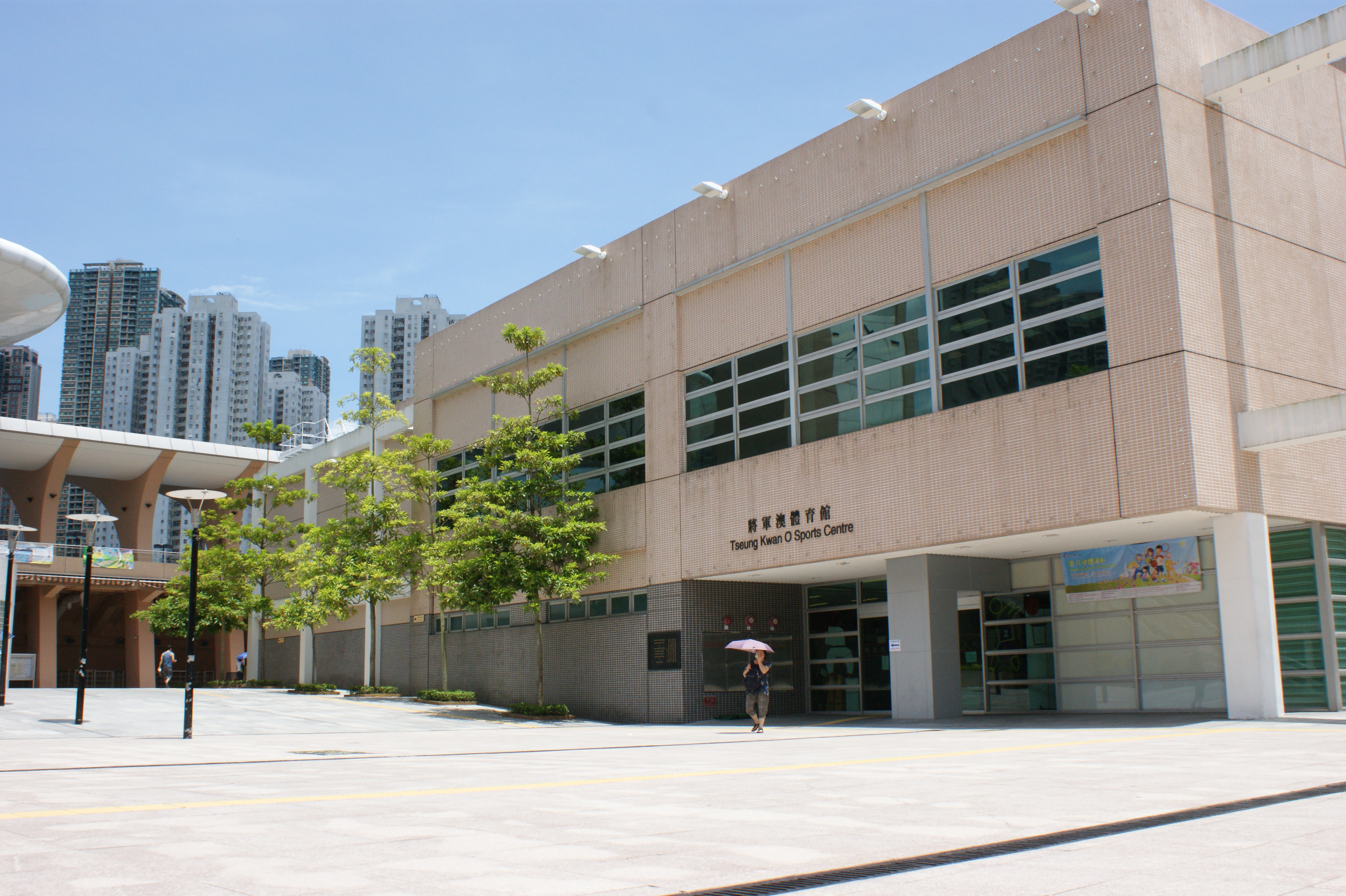 中文（香港）: 將軍澳體育館門外